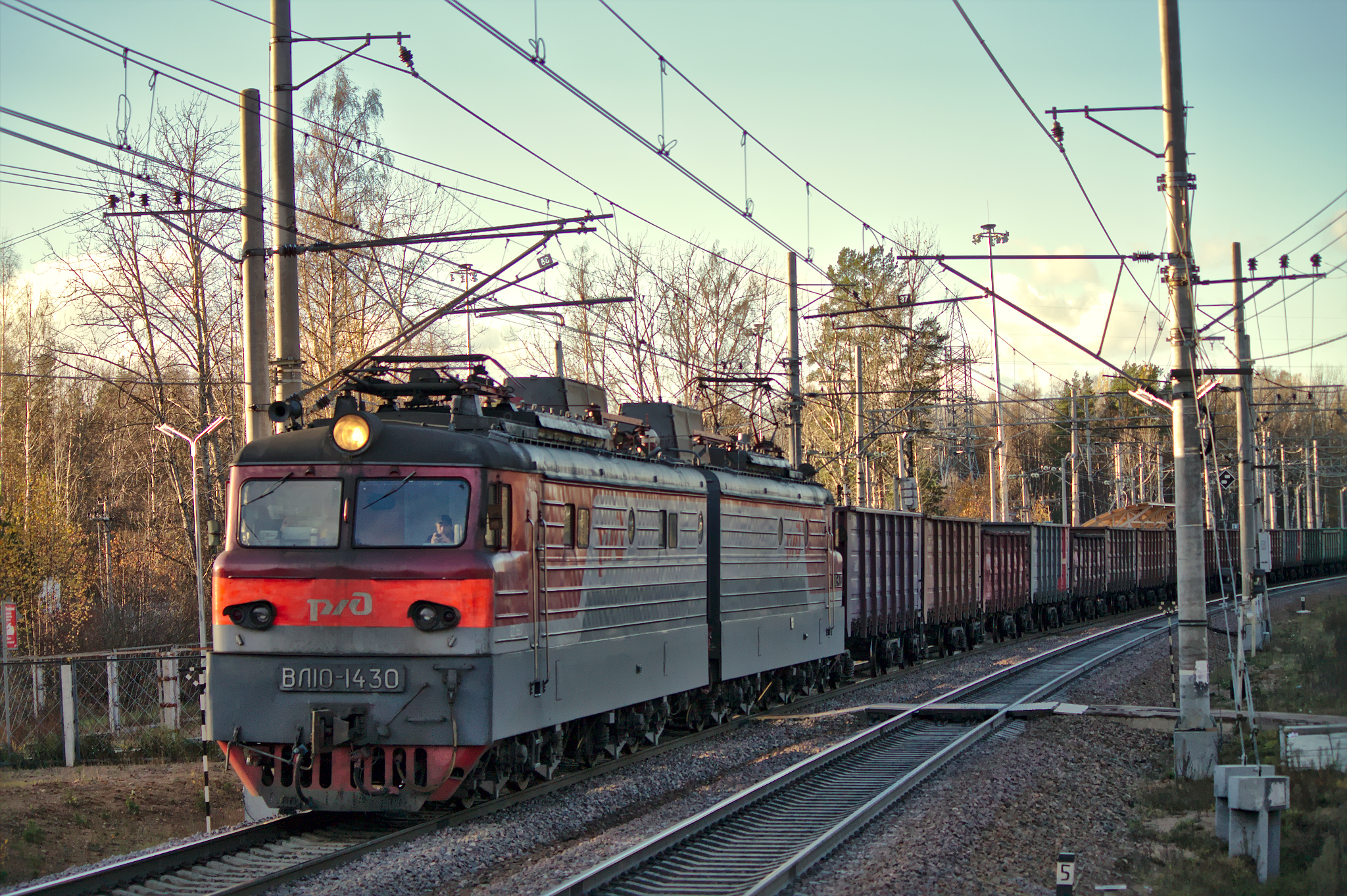 ВЛ10-1430 с грузовым, Ушково. см. фото 550779 в альбоме автора